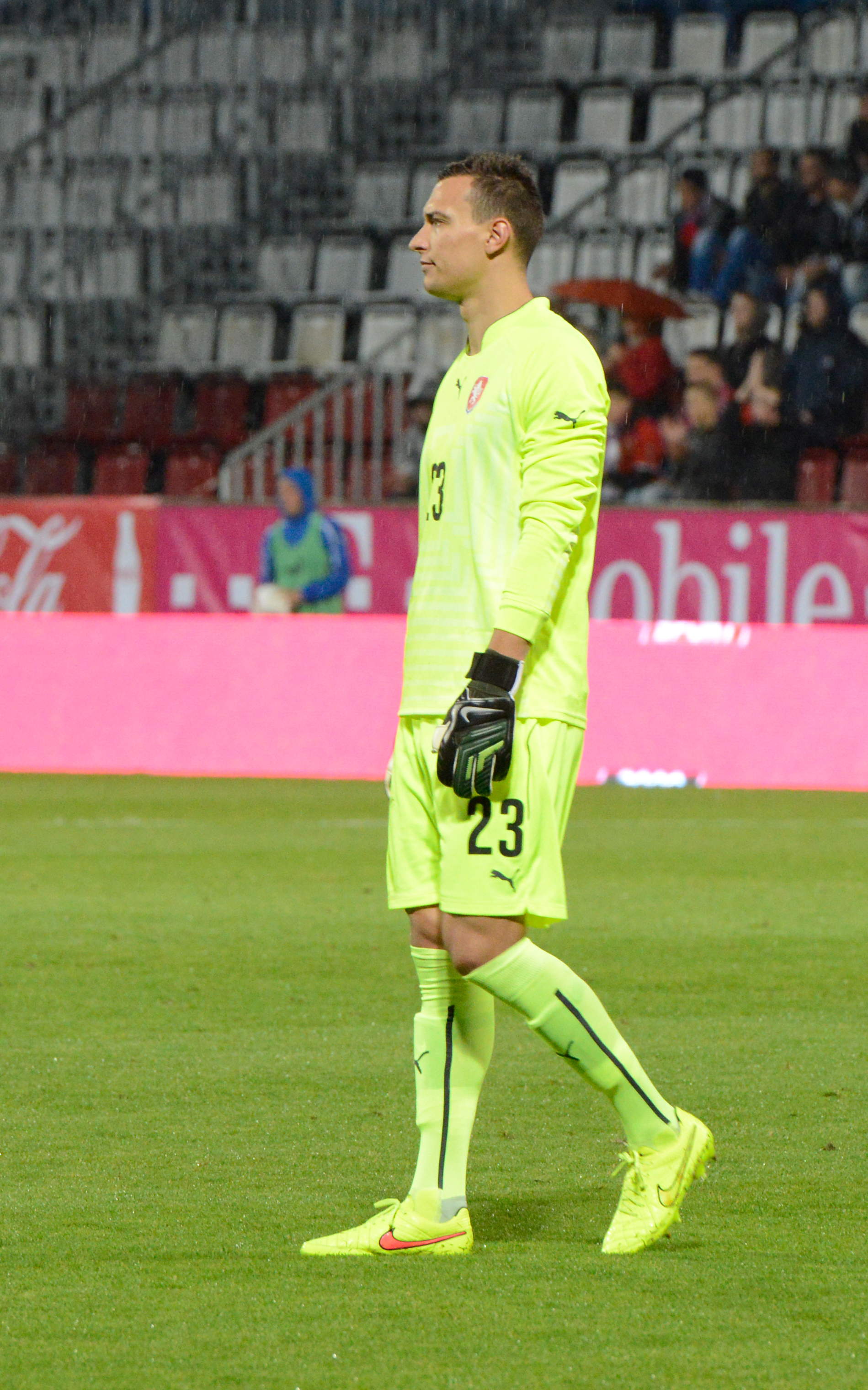 Mezinárodní fotbalový zápas Česko - Rakousko v Olomouce